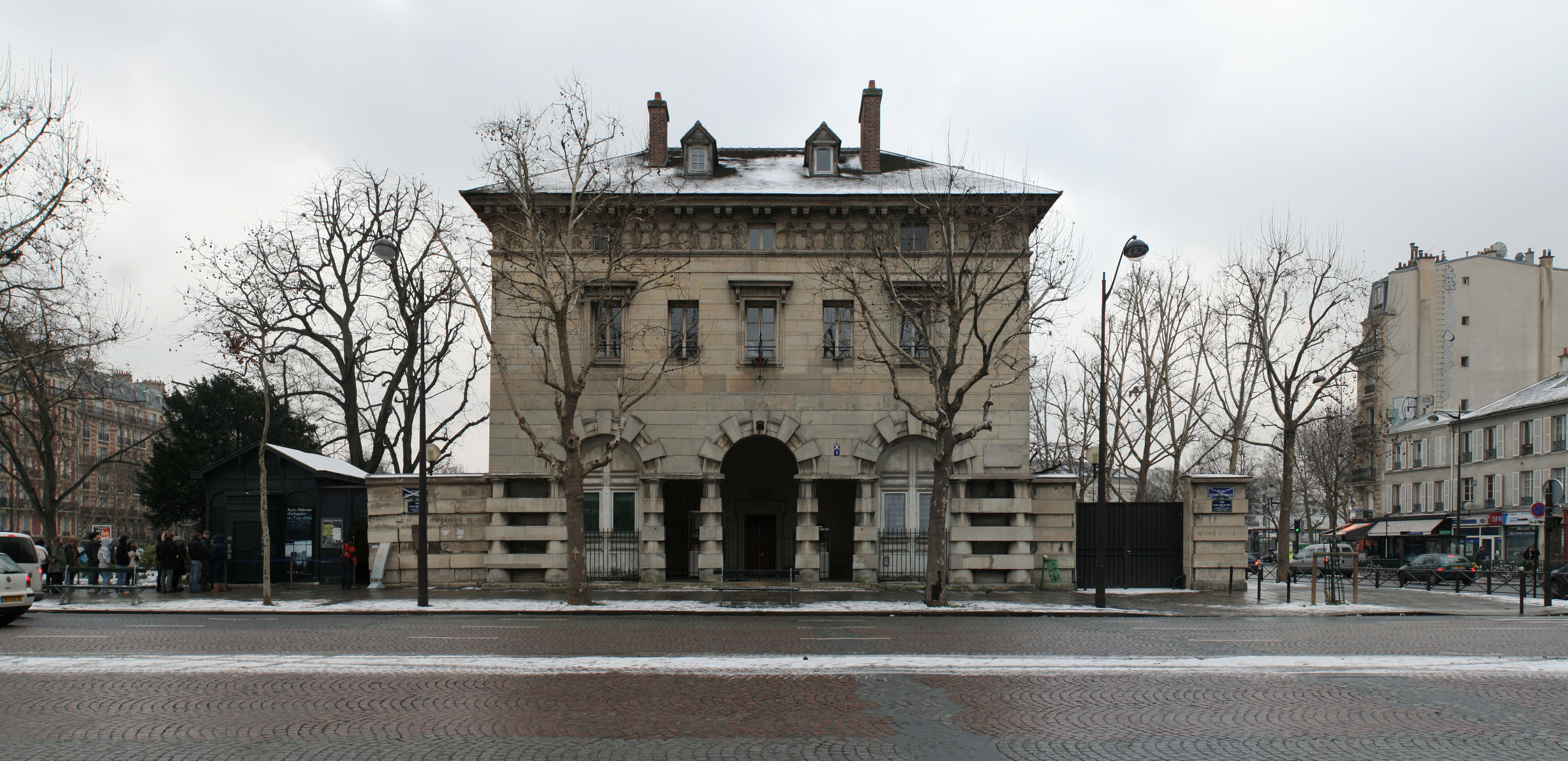 Pavillon est de la Barrière d'Enfer avec l'entrée des Catacombes, place Denfert-Rochereau, Paris